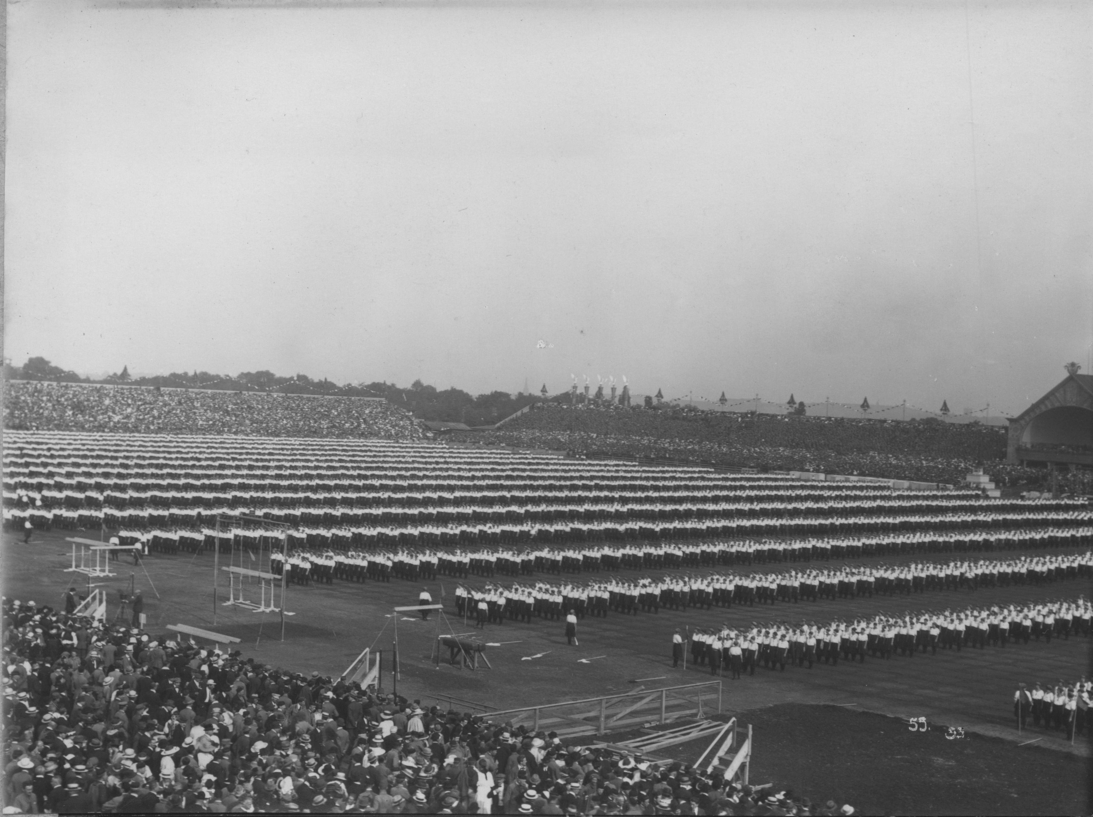 ligne quadruple lors des Sokol, 1920.